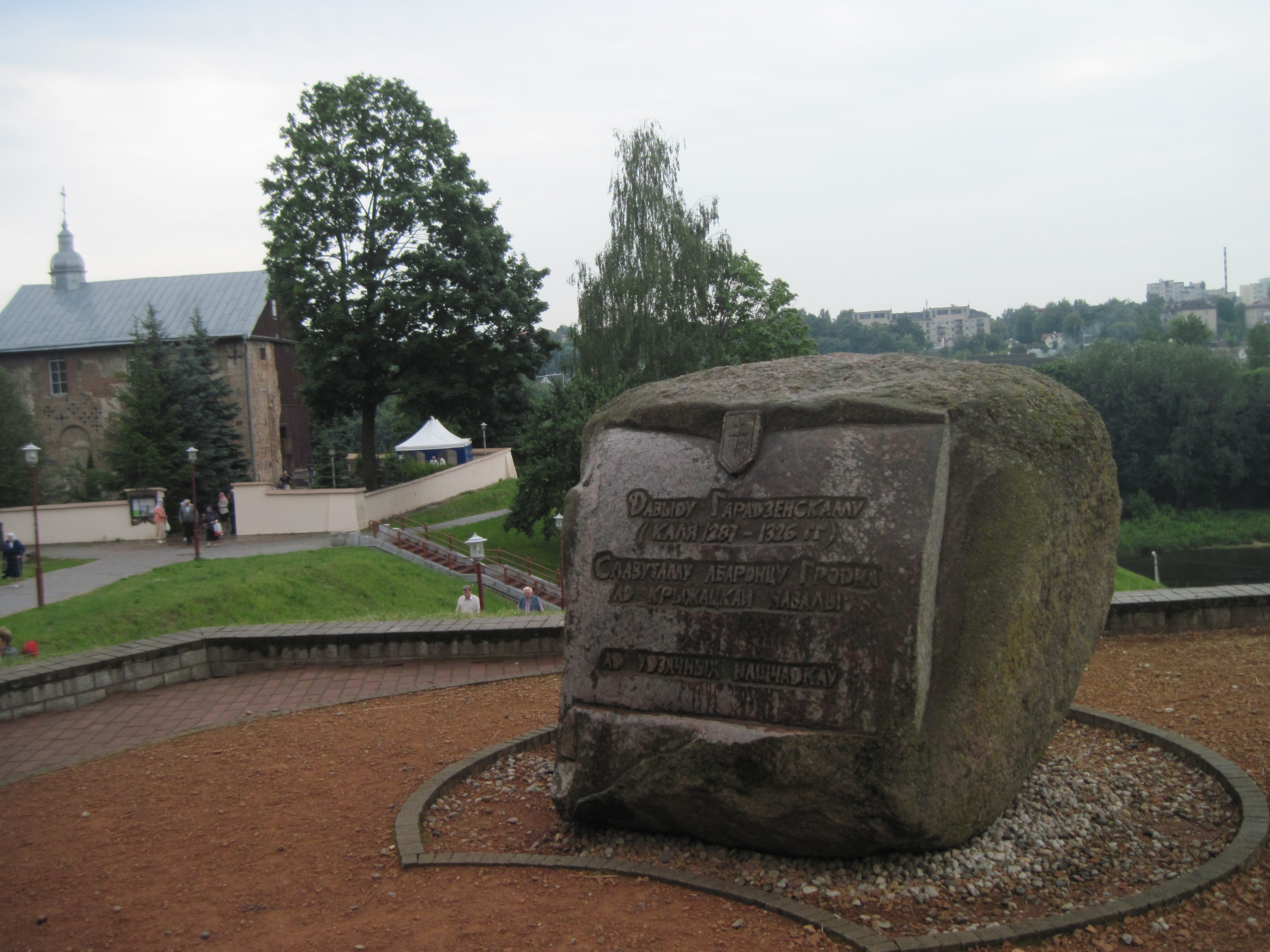 Помнік Давіду Гарадзенскаму каля Каложскай царквы ў Гродне